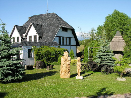 Padvariai, Kretingos raj.. Kaimo turizmo sodyba. Foto: Algirdas, 2006 m. birželio 29 d., lietuva